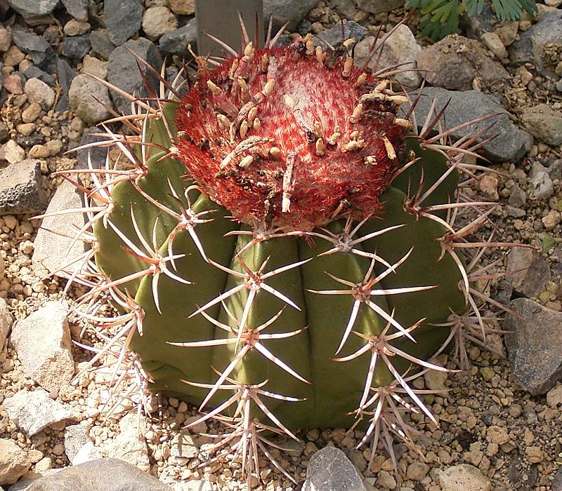 Melocactus curvispinus